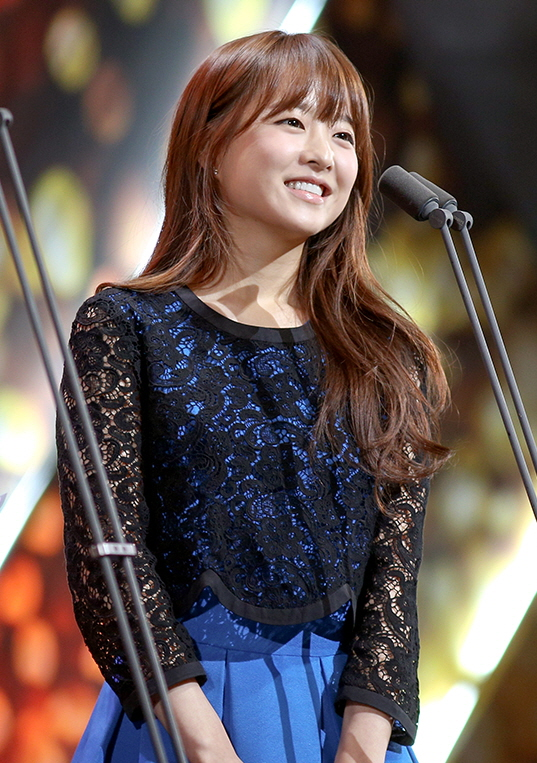 121211 골든 글러브 시상식 박보영 직찍